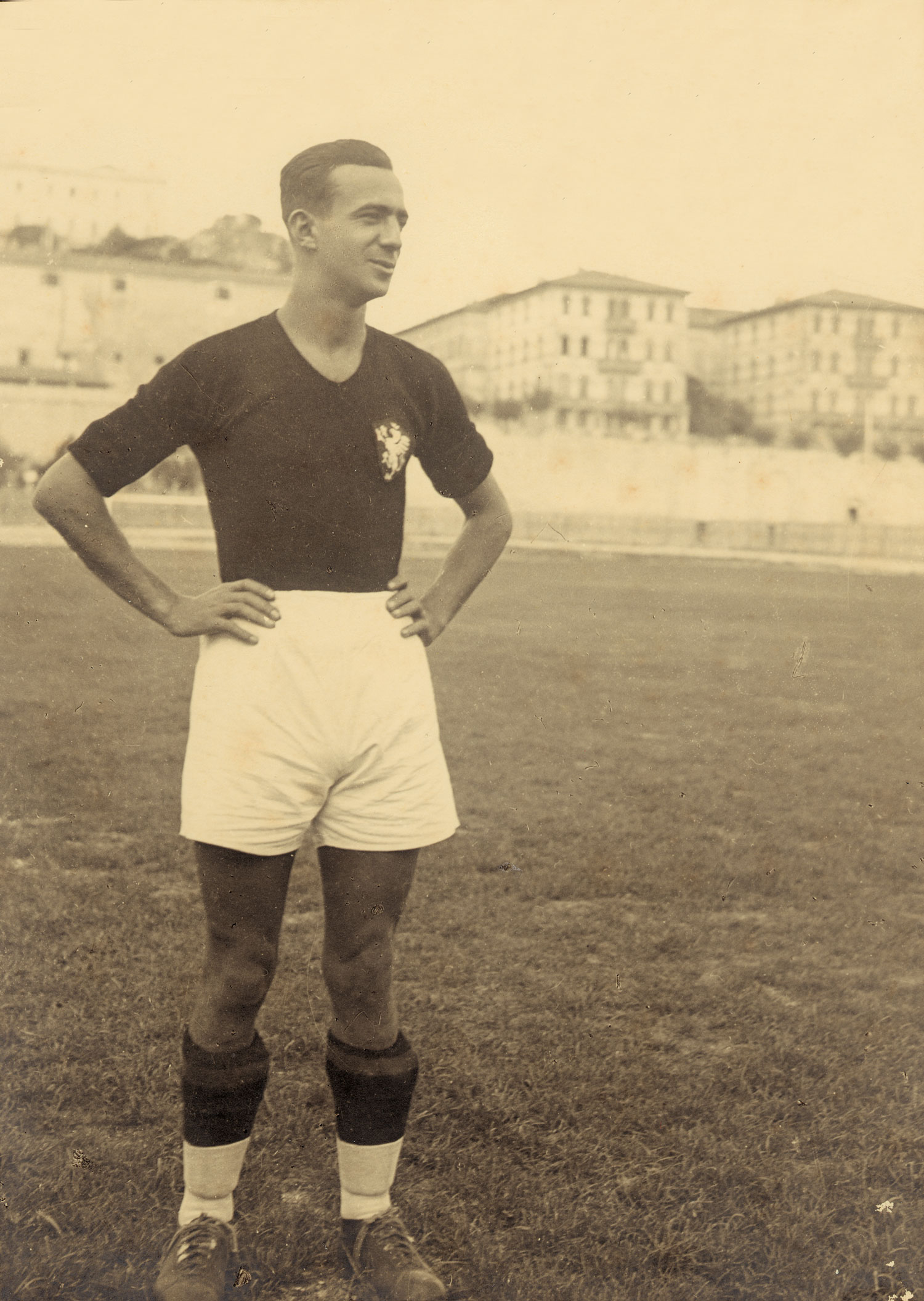 Il calciatore mirandolese Libero Lolli (1930)